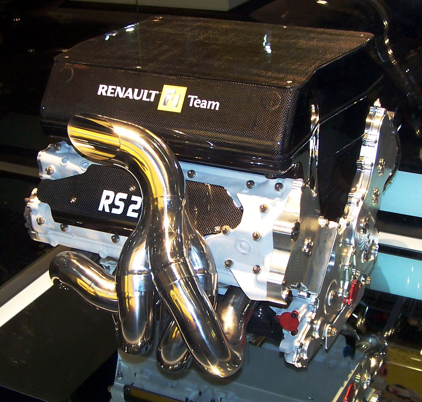 Renault F1: Renault R27 (2007), V8 engine, 2,400cc.